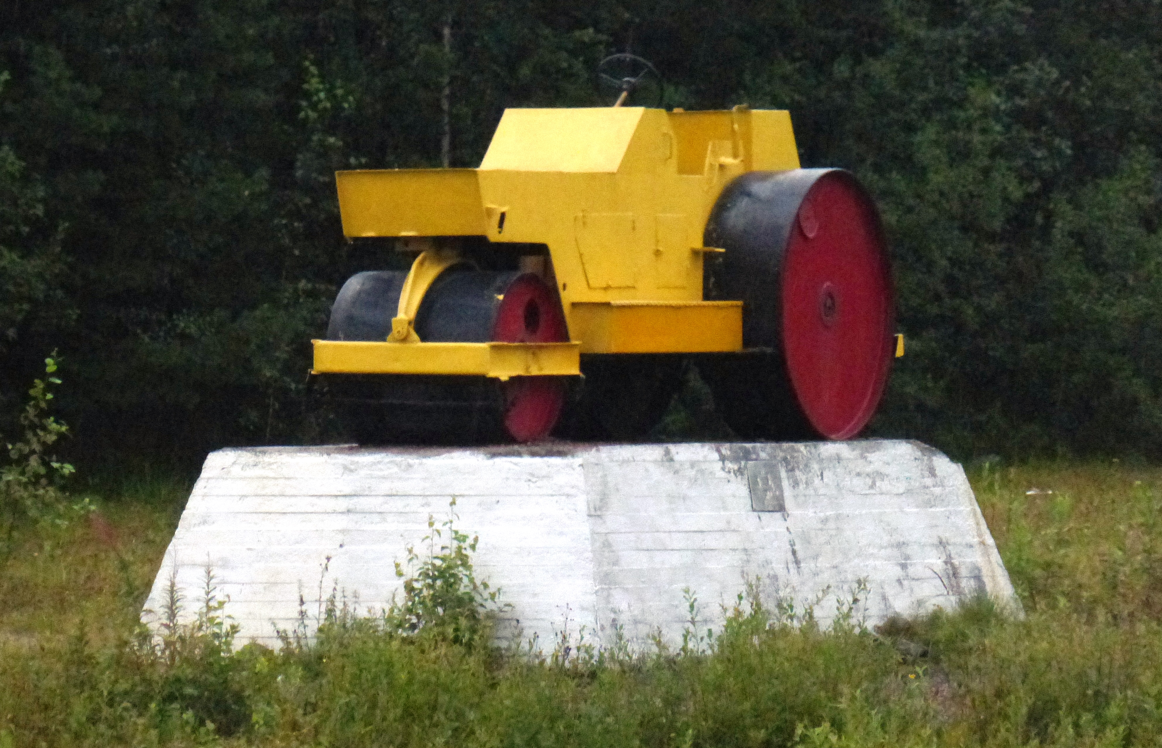 Памятник дорожному катку на автодороге "Кола" вблизи г. Кондопога, Республика Карелия.